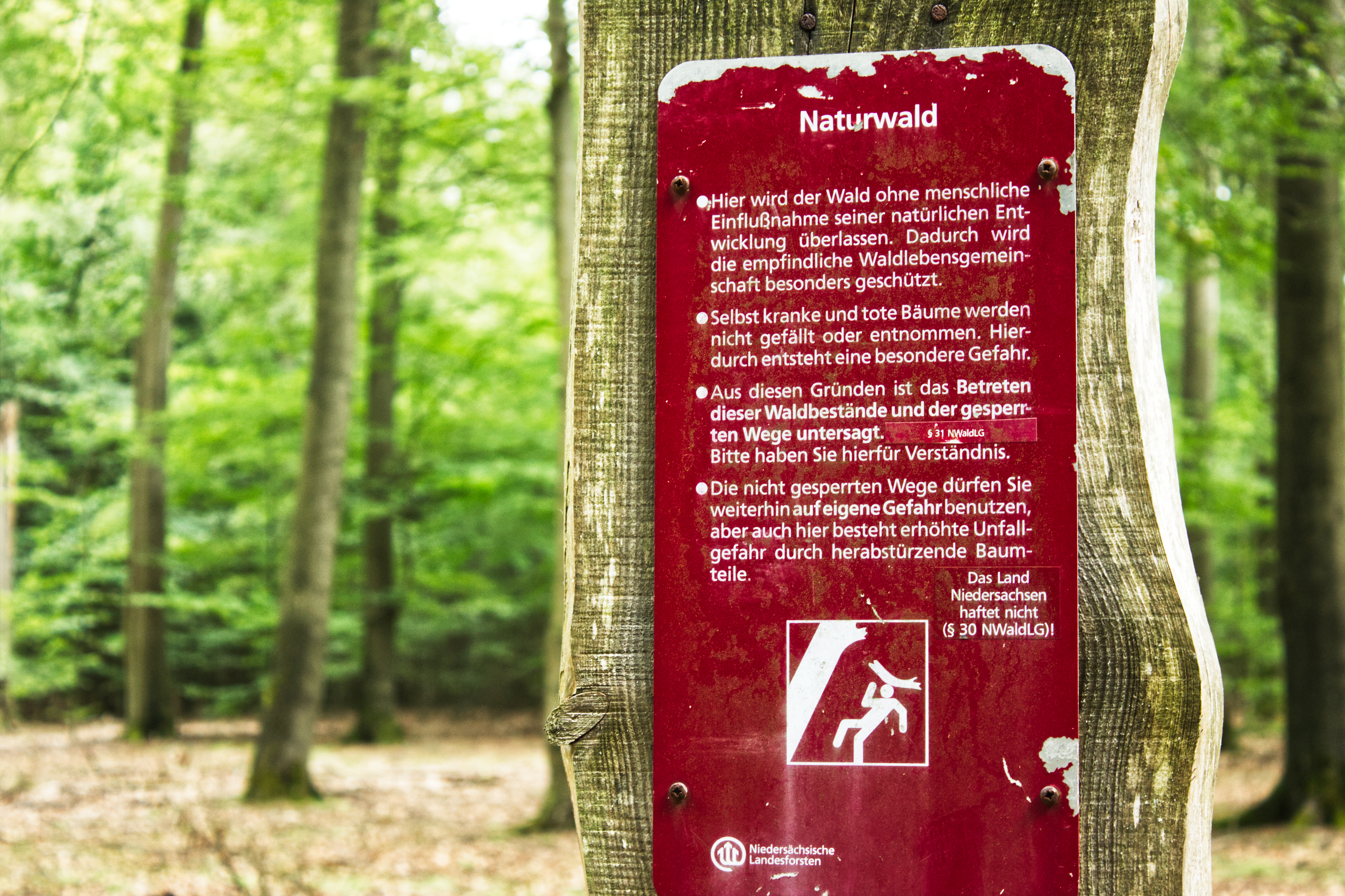 Warnschild am Rande des Naturwald Lüßberg